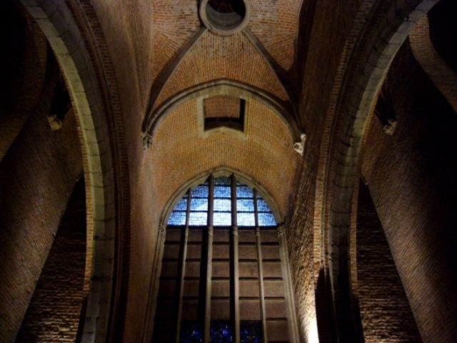 Michaelskapel, Domtoren Utrecht